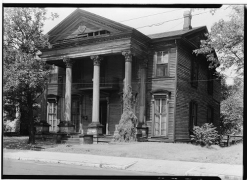 Літлтон-Петіт Хаус, Мемфіс, Теннесі, дерев'яна архітектра 1848 року